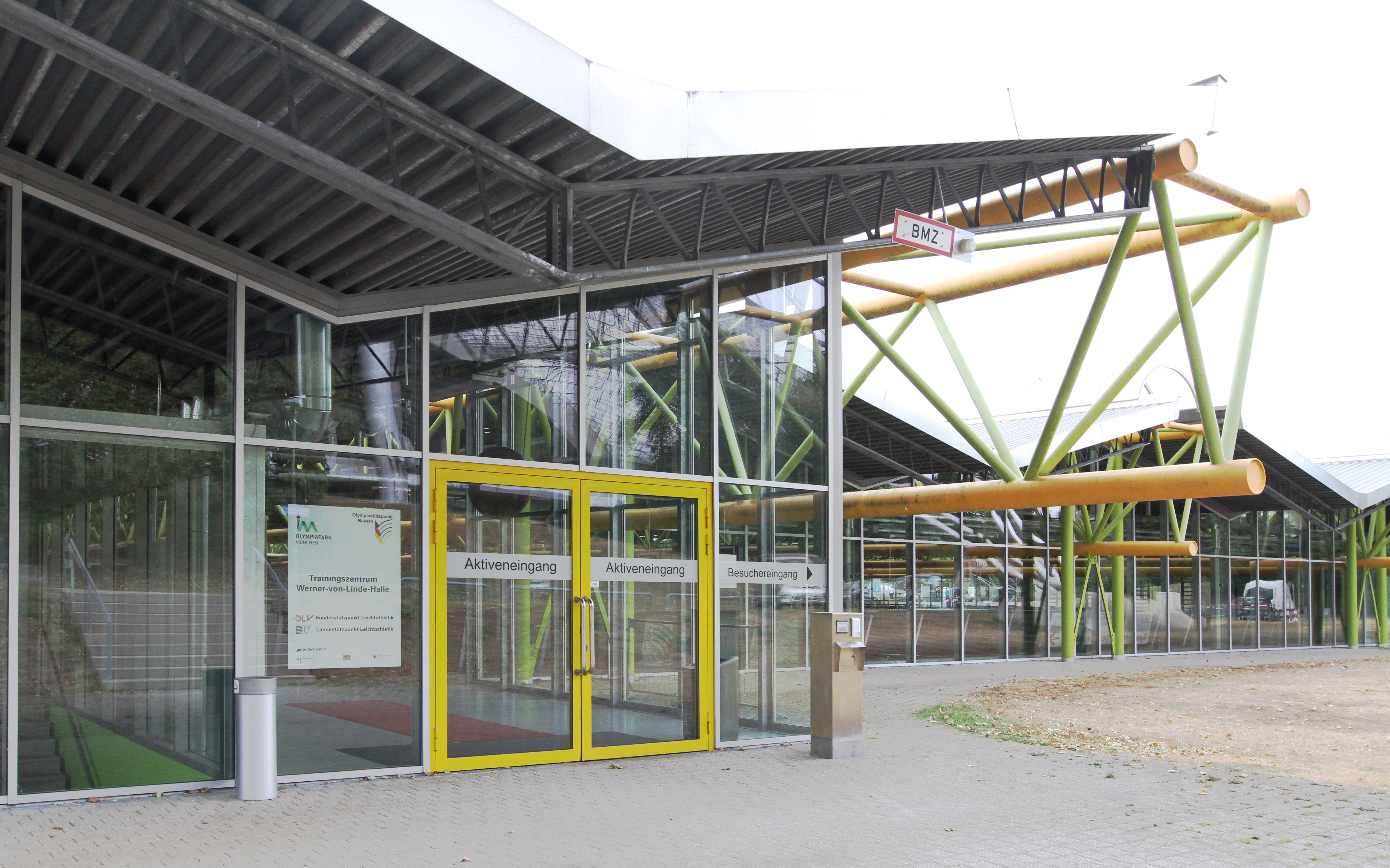 Werner-von-Linde-Halle, München, Olympiapark. Die Halle wurde für die Olympischen Sommerspiele 1972 errichtet und als Aufwärmhalle der Leichtatleten verwendet. Heute dient sie als Trainingshalle für den Spitzen- und Breitensport.